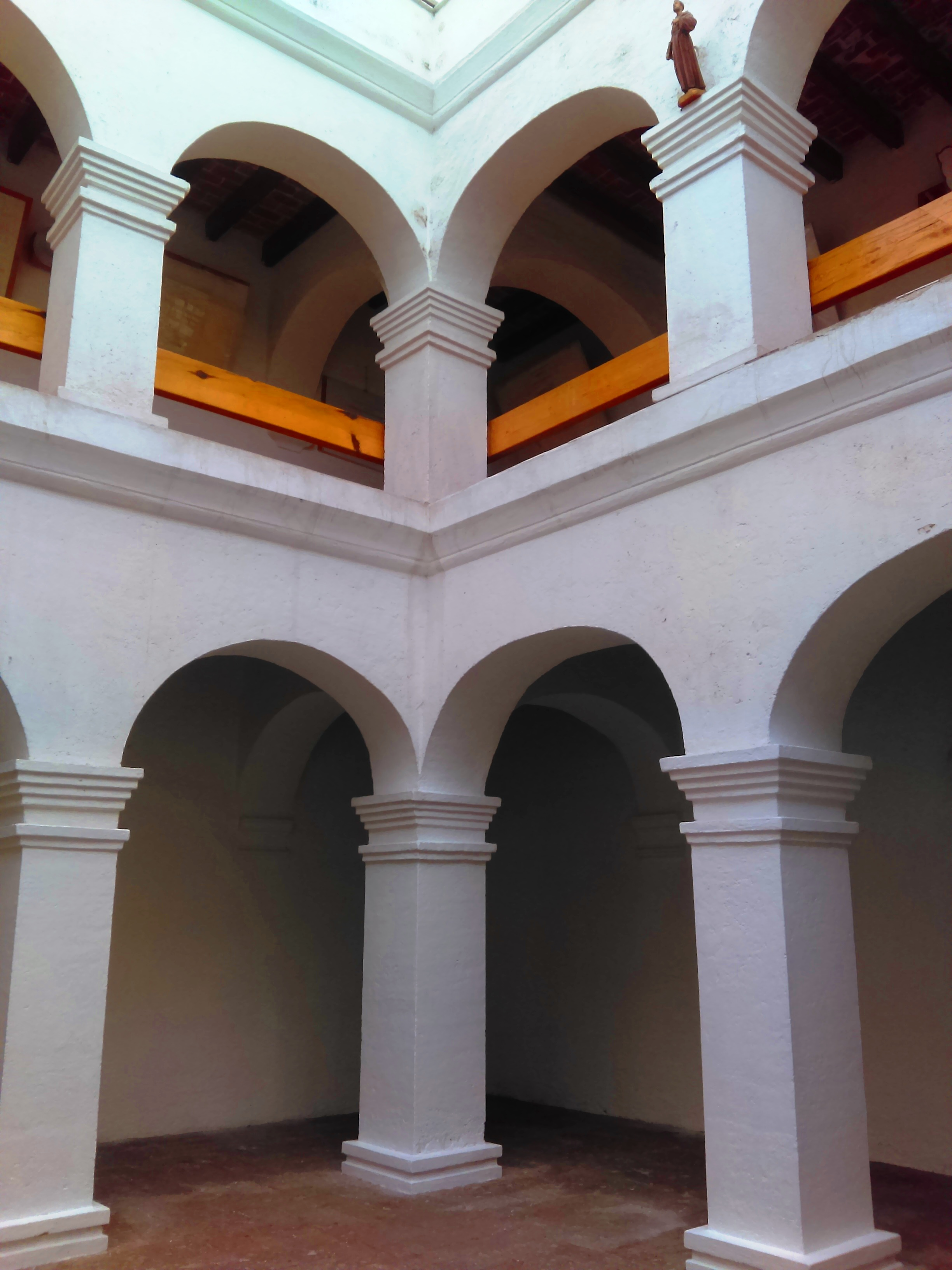 Exconvento de San Francisco en Pachuca, México.